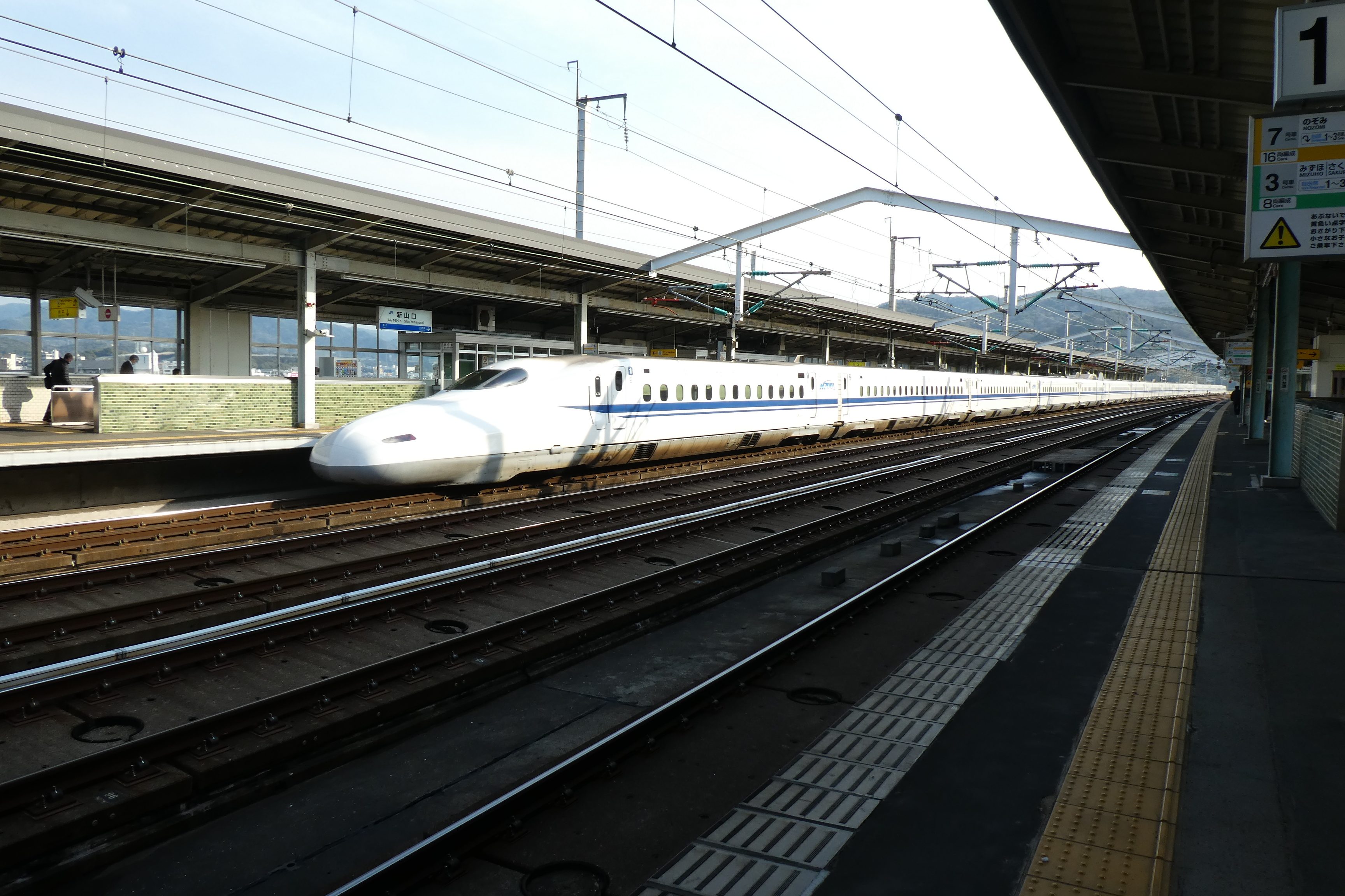 新山口駅を発車するのぞみ号